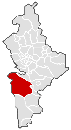 Ubicación geográfica del municipio de Galeana en el estado mexicano de Nuevo León.